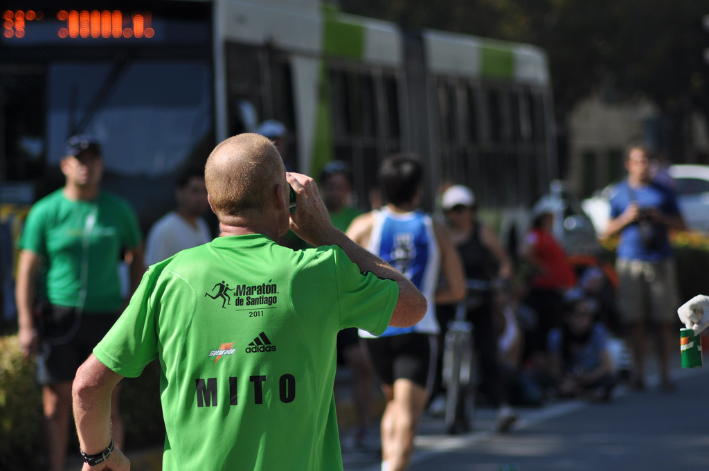 El famoso Mito